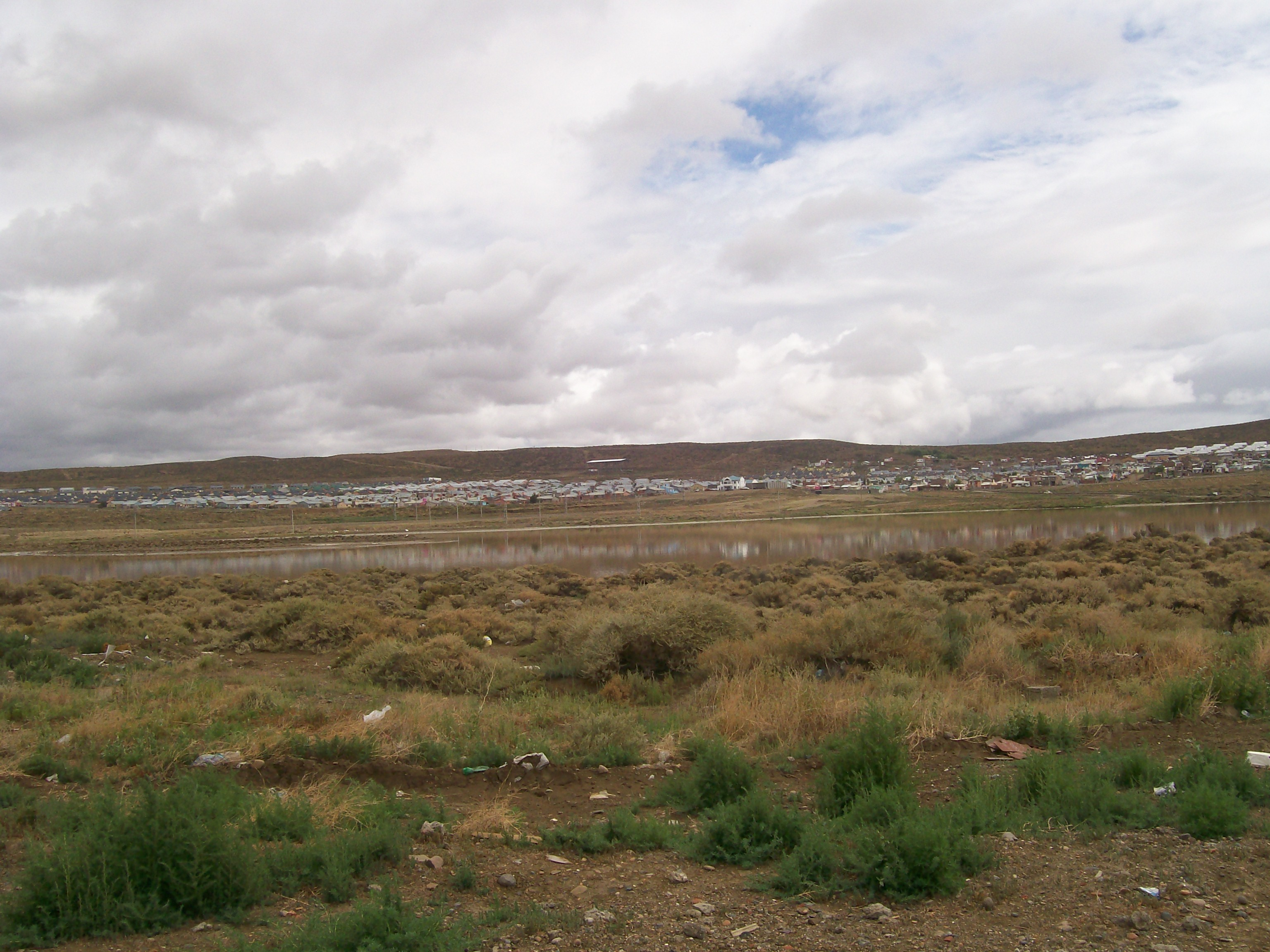 vista al rotary desde el Gran Jardín